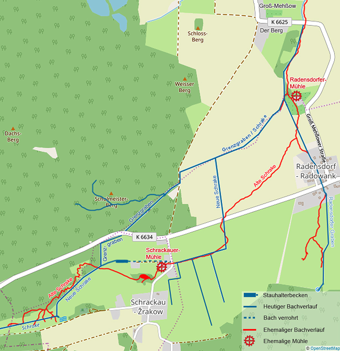 Gesamtübersicht über die Meliorationsarbeiten an der Schrake im Süden der Mehßower Landschaft des 20. Jahrhunderts (hauptsächlich in der DDR-Zeit, 1981) – das Bachbett wurde begradigt und auch teilweise völlig neu verlegt. Kartengrundlage: OpenStreetMap.